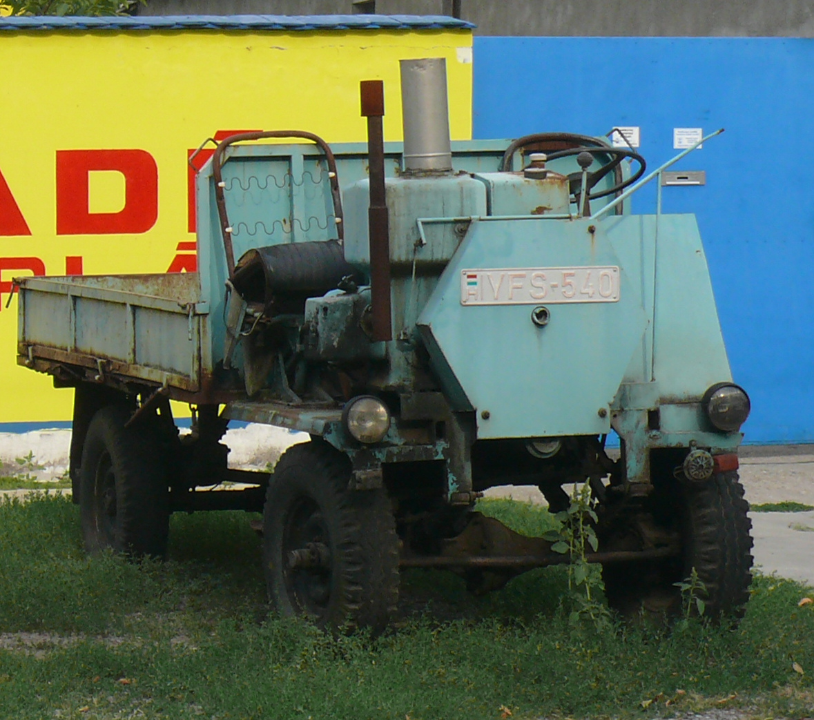 Csettegő munkagép Vaskúton